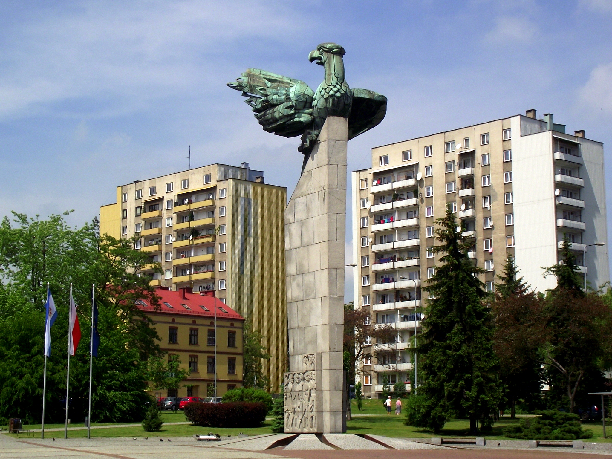 Pomnik Wolności i Zwycięstwa na pl. Tysiąclecia w Chrzanowie, w tle bloki Osiedla Północ.